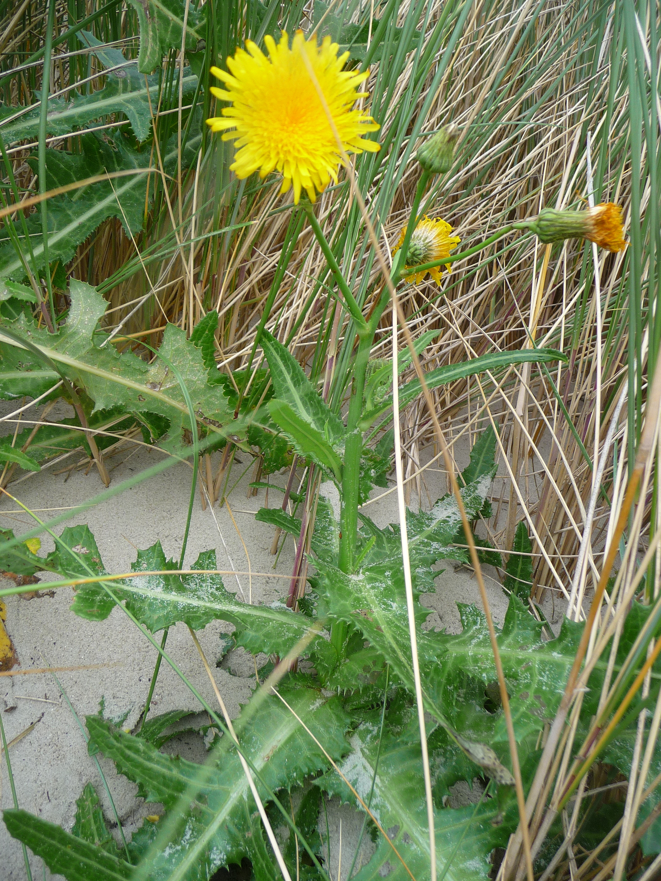 Blühende Acker-Gänsedistel (Sonchus arvensis) auf der ostfriesischen Nordseeinsel Juist (Niedersachsen, Deutschland)